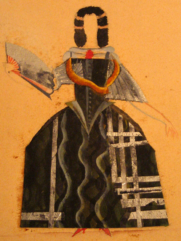 Игнатий Игнатьевич Нивинский. Эскизы костюмов к спектаклю по пьесе П.Кальдеровна "Дама невидимка" в постановке 2-й студии МХТ. 1924. Бумага, цветная бумага, графитный карандаш, акварель